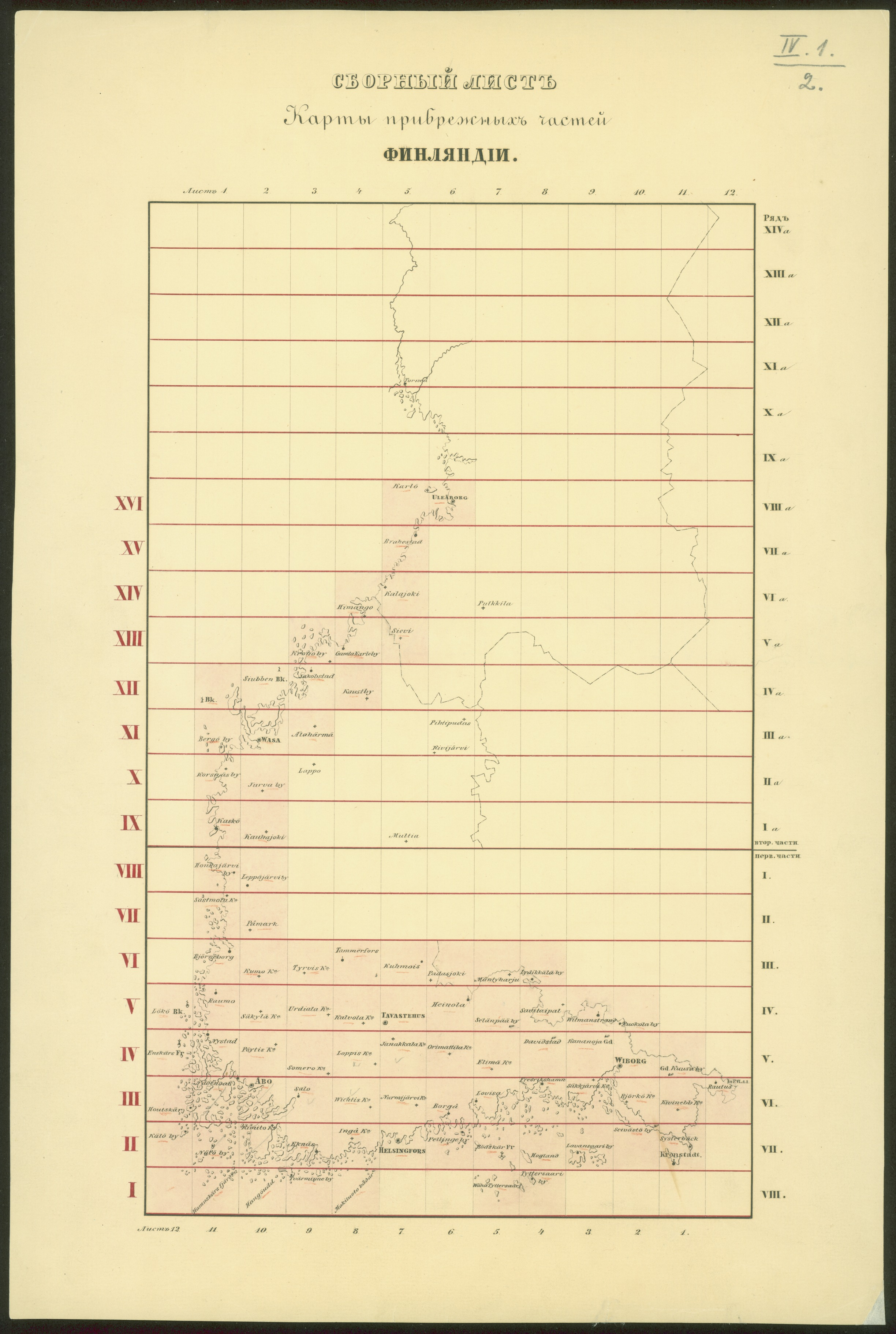 Eversti Gustav Adolf Kalmbergin toimittama keisarillisen Venäjän sotilaskartasto, joka julkaistiin vuosina 1855-1856. Omistaja on Kansalliskirjasto, joka on luopunut teosten ja kopioiden kaikista oikeuksista .